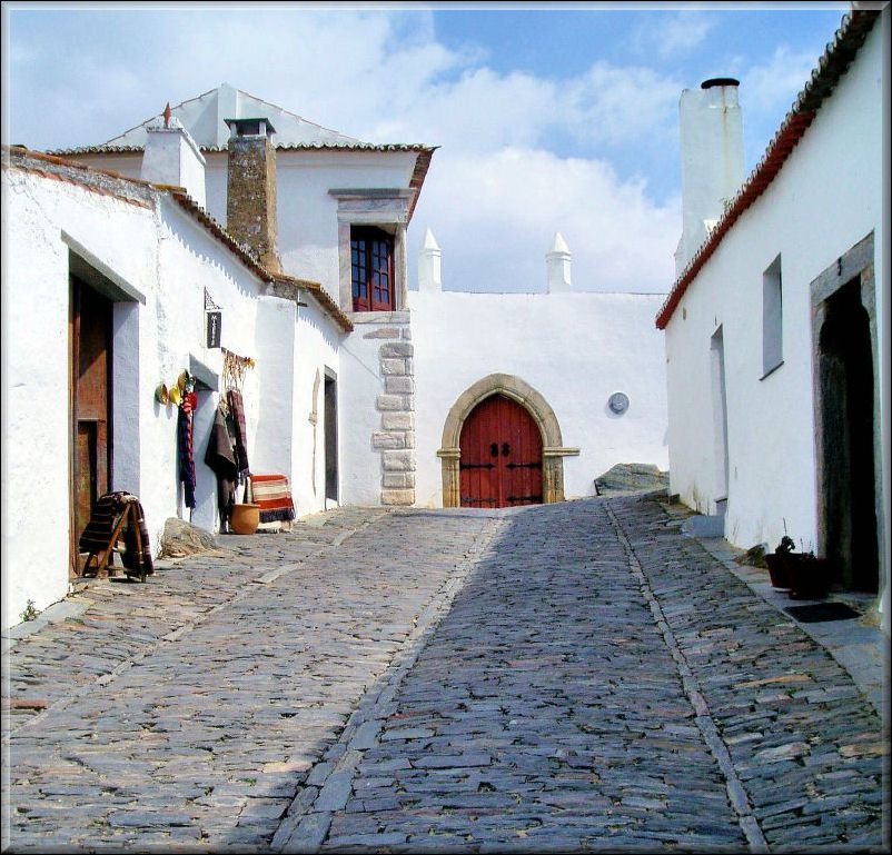 Street in Monsaraz, Portugal